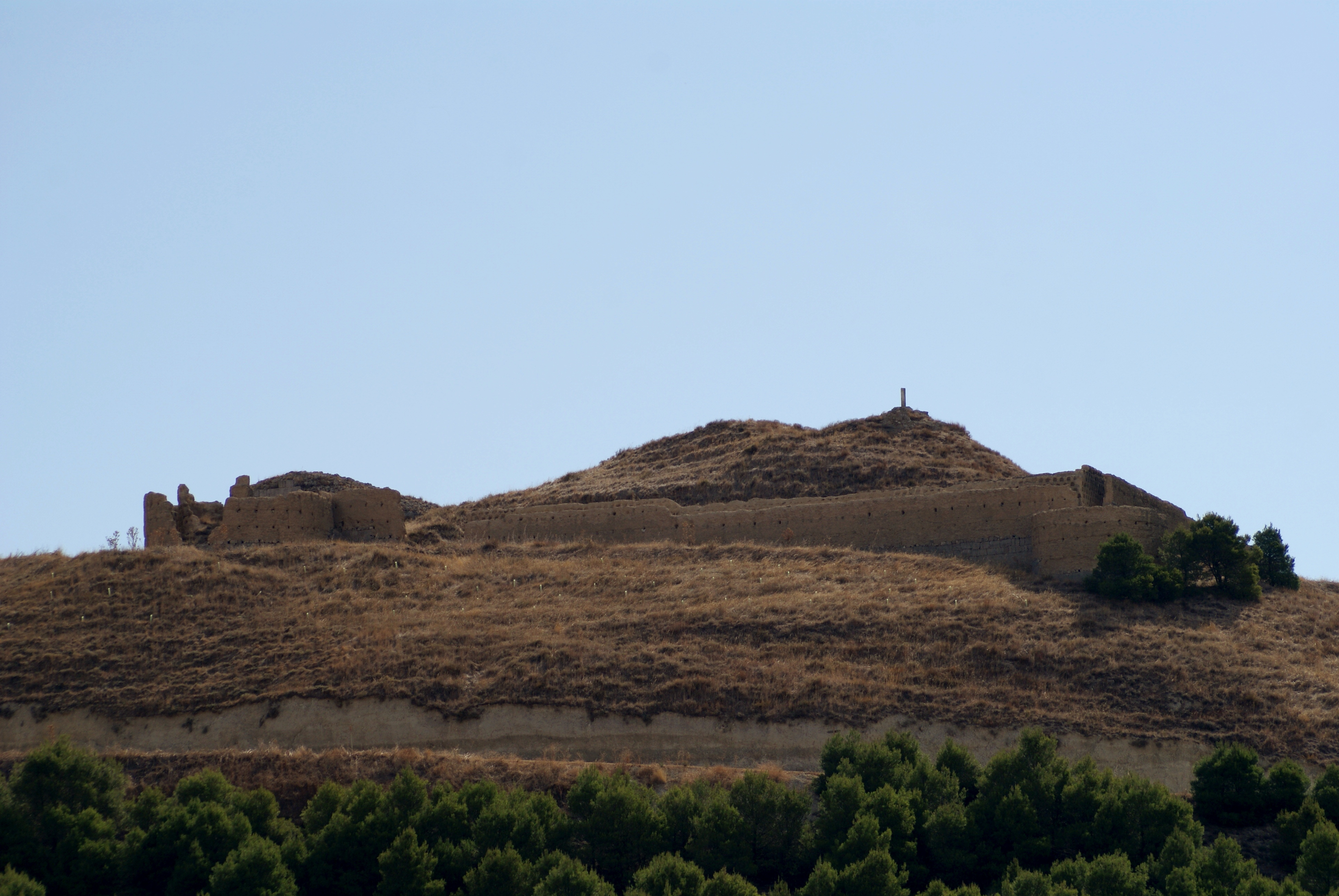 Castillo de Torremormojón, en la localidad homónima de la provincia de Palencia (España). El castillo, que está declarado Bien de Interés Cultural, se encuentra en total estado de ruina a fecha 2011.